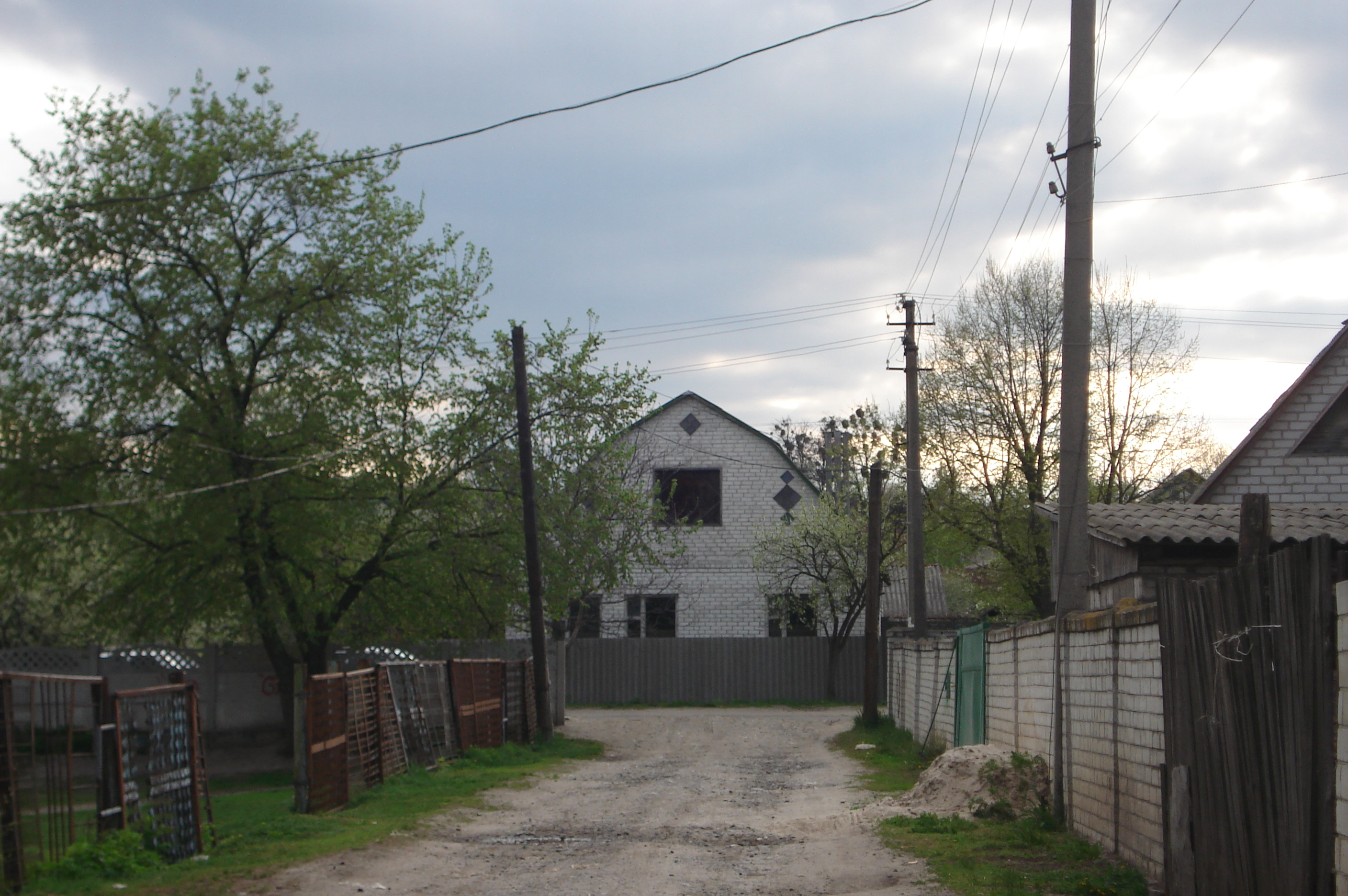 Улица в Бабаях